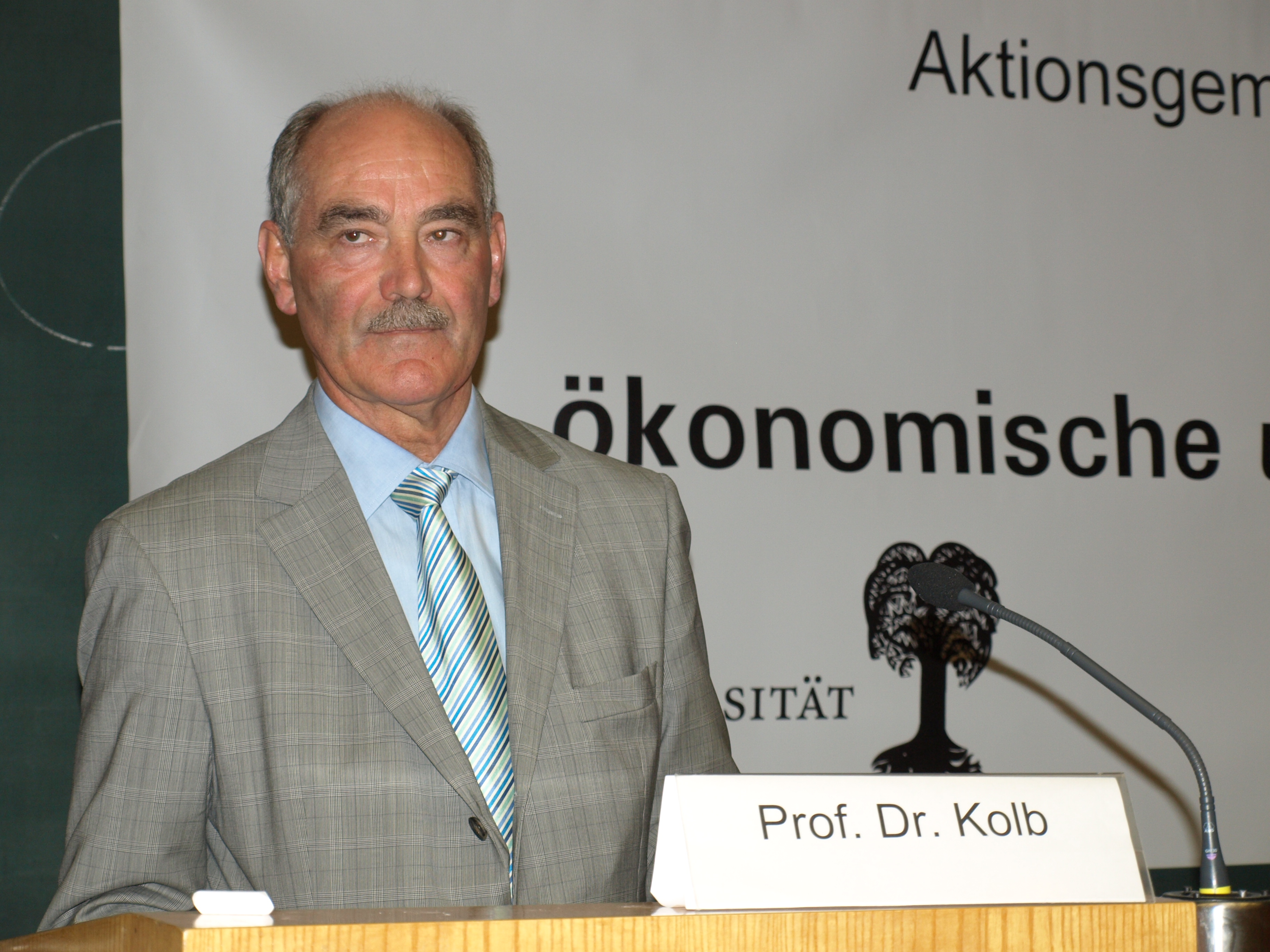 Der Althistoriker Frank Kolb, Experte für die Stadt in der Antike, beim Vortrag "Das Imperium Romanum: Ein antikes Modell einer globalisierten Wirtschafts- und Werteordnung?" im Rahmen der ASM-Reihe Globalisierung.